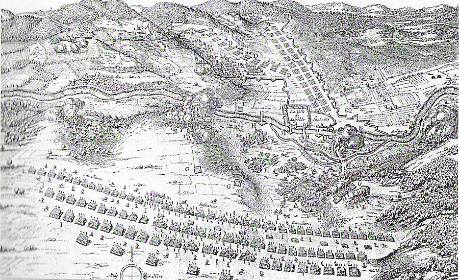 Stellungsplan der Armeen bei Saalfeld im Mai 1640